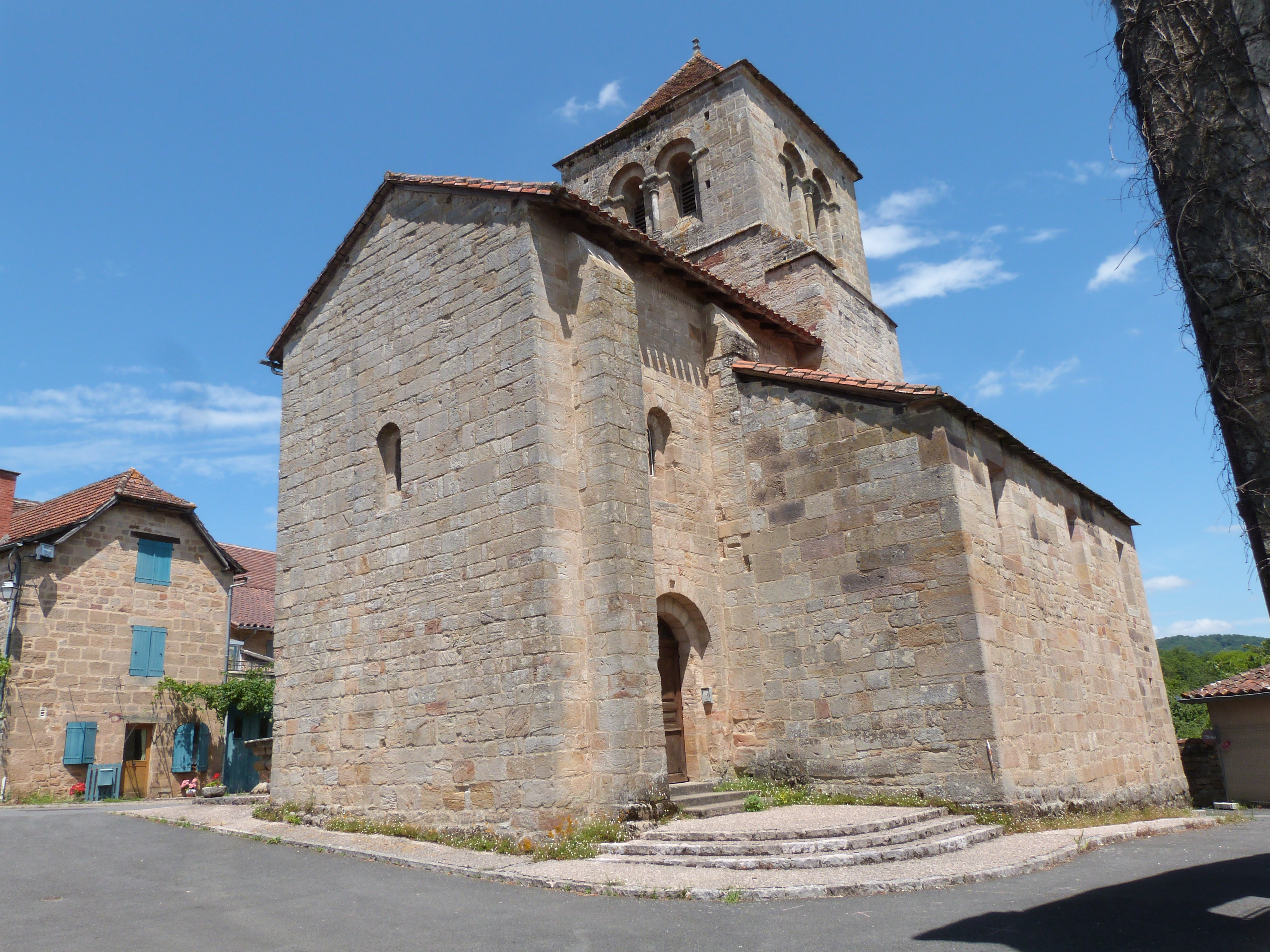 Vue depuis le sud-ouest de l'église Sainte-Croix (Le Bouyssou, Lot)